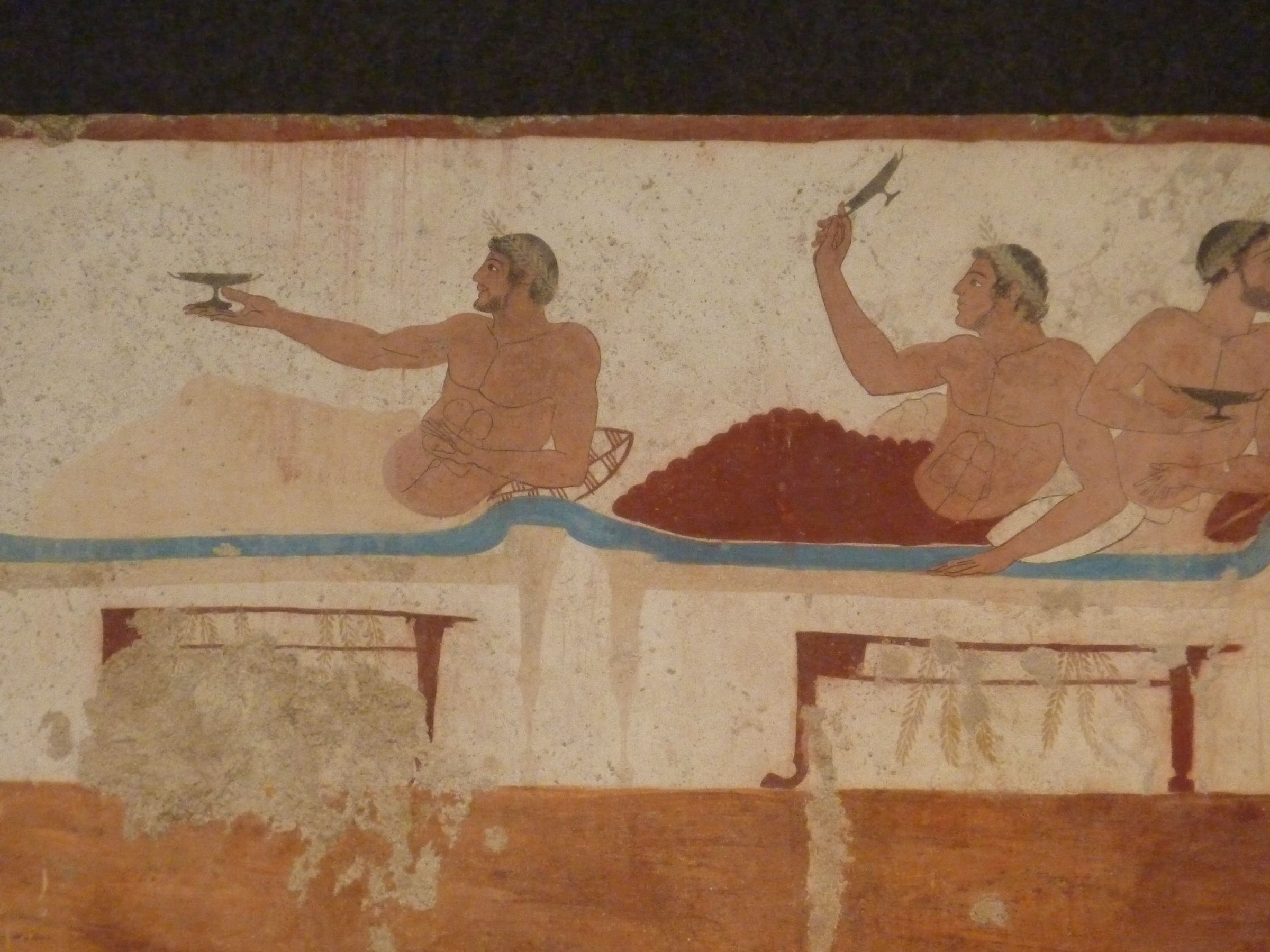 Grab des Tauchers, Längsplattendetail